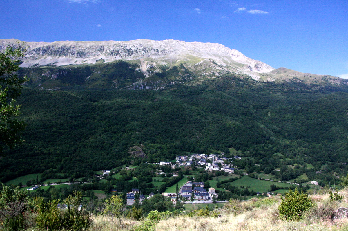 Vista general de Vilanova d'Éssera (Osca, Espanya) amb la serra de Chia al darrera.